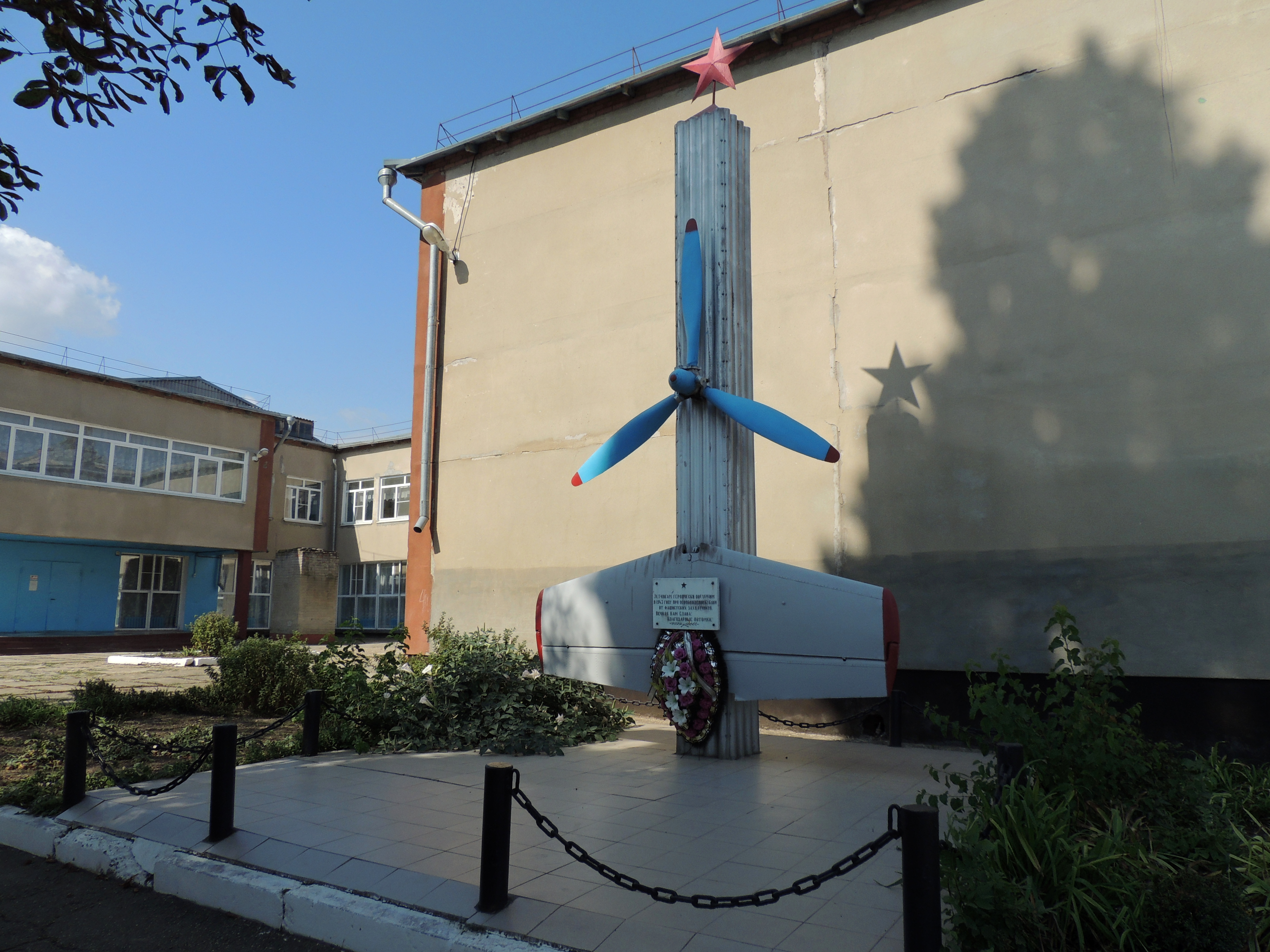 Могила неизвестных двух летчиков, погибших в бою с фашистскими захватчиками: ср. школа № 21, с. Новосельское, Новокубанский район, Краснодарский край В настоящее время средняя школа № 12